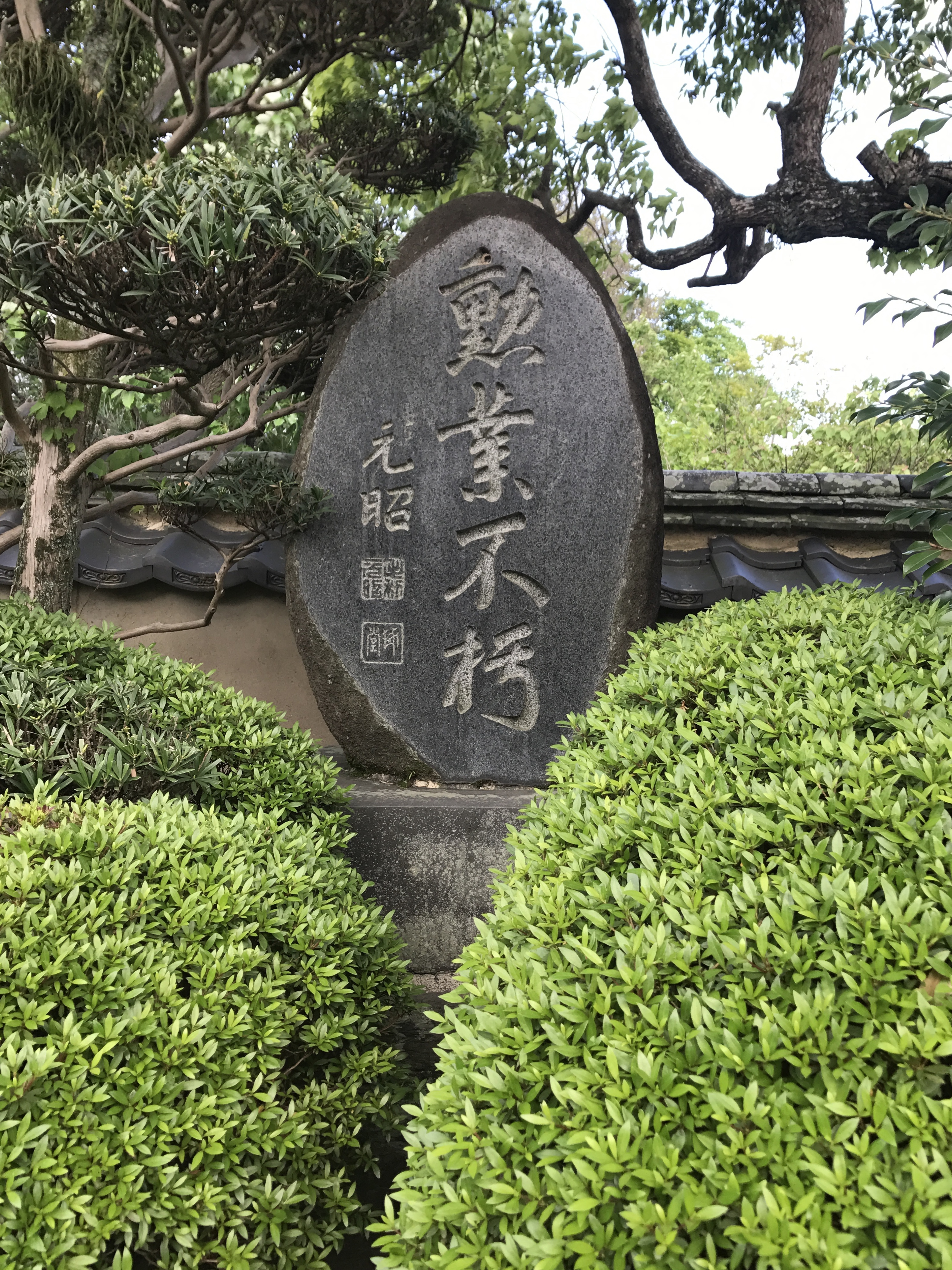 高杉晋作誕生地の石碑